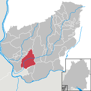 Lörrach, Landkreis Lörrach, Baden-Württemberg